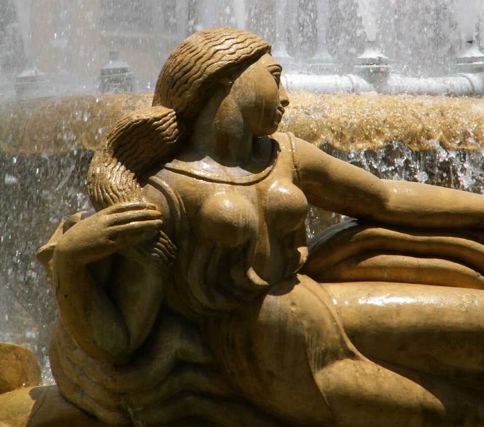 El conjunto urbanístico de El Silencio es obra del insigne arquitecto Carlos Raúl Villanueva y con más de 60 años de historia se ha convertido en simbolo de las transformaciones profundas que ha sufrido nuestro país. Las esculturas en la fuente O'Leary, en el centro del conjunto, son de Francisco Narváez. Más sobre esta importante obra de planificación urbana aquí.